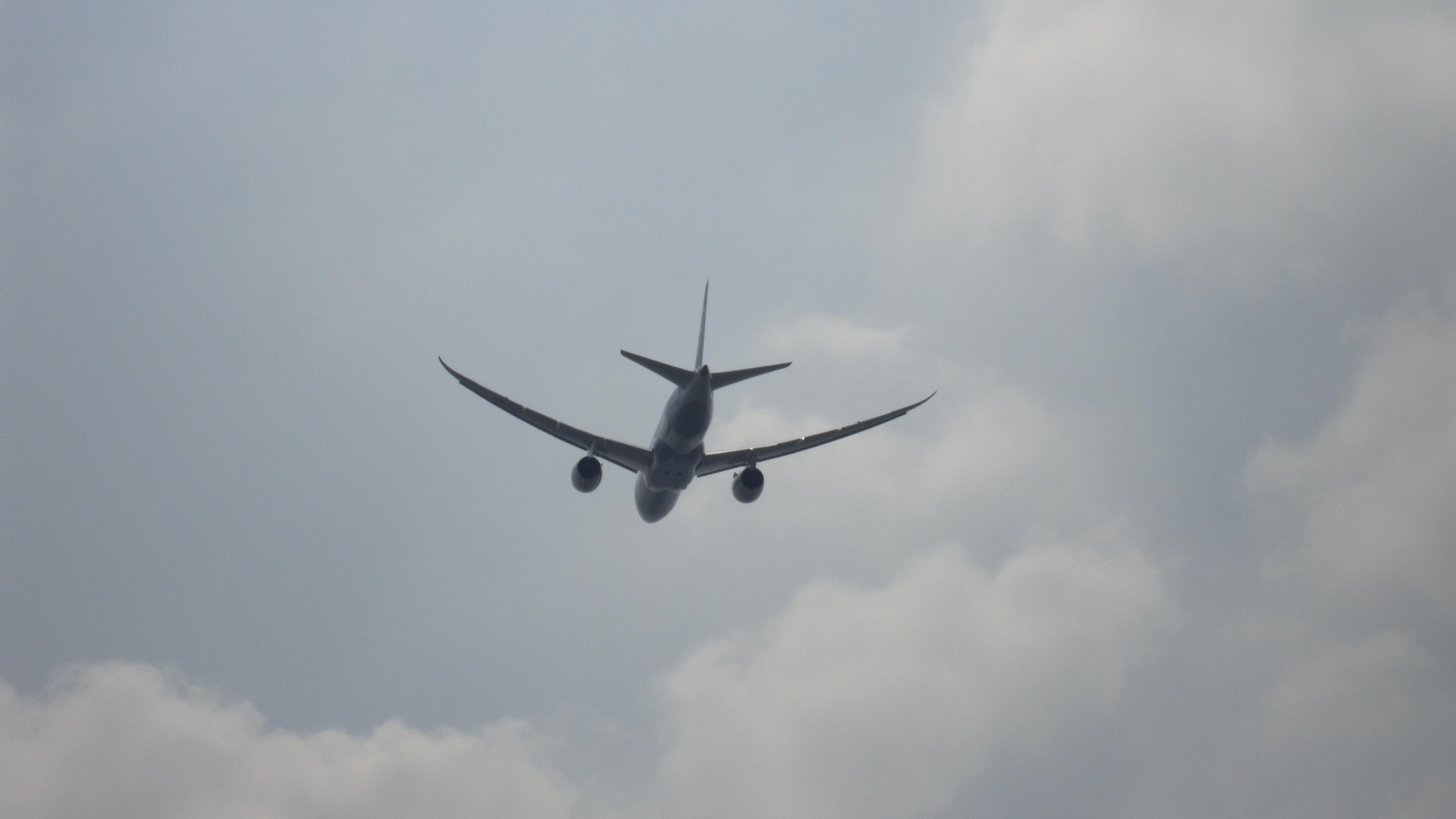 中文（台灣）: 離開台北松山機場的全日空波音787 JA808，本角度可清楚見到超臨界機翼。